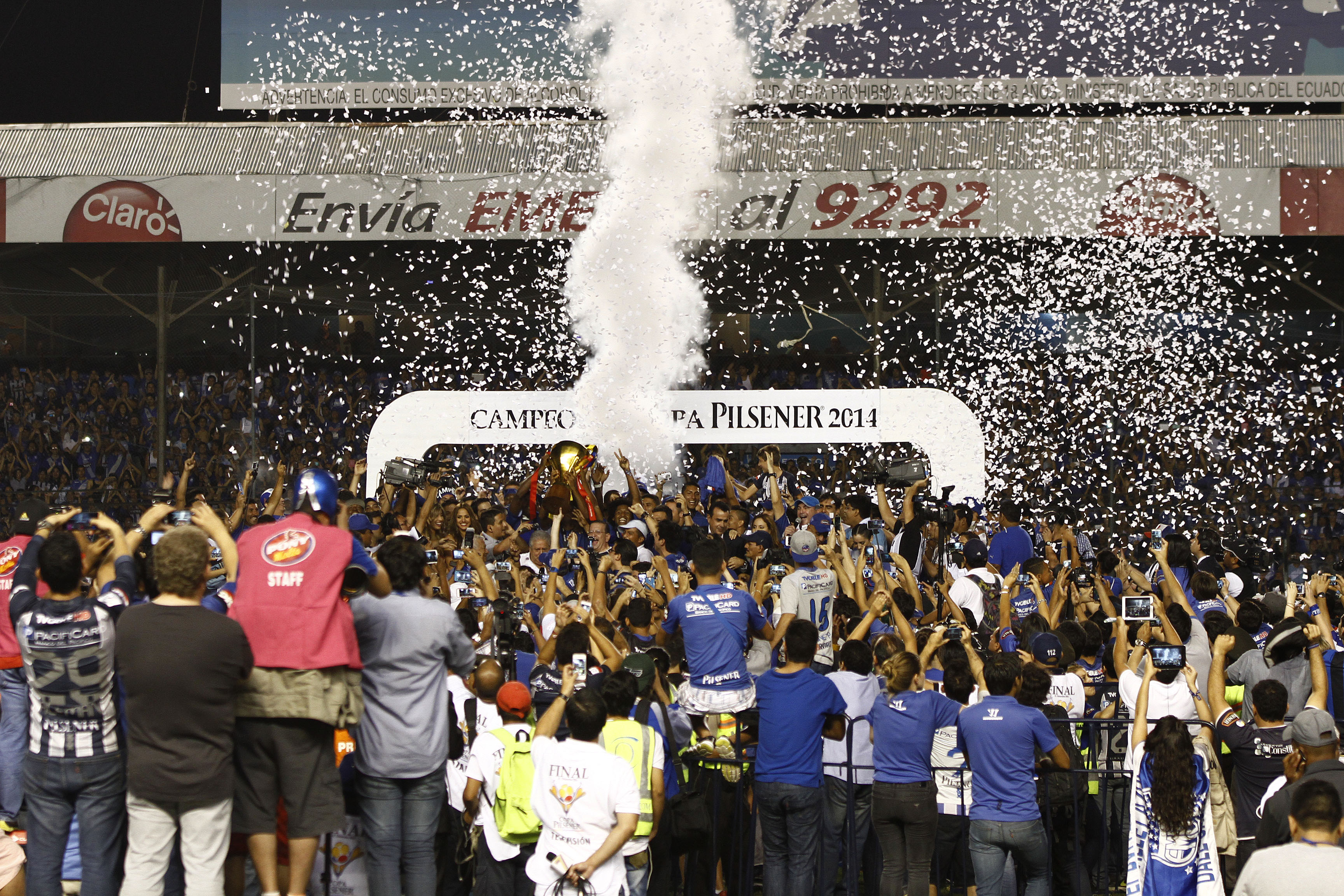 Guayaquil, Ecuador, 21 dic (ANDES).- El conjunto guayaquileño Emelec conquistó este domingo la edición 57 del campeonato ecuatoriano de fútbol. Foto: Micaela Ayala V./ANDES